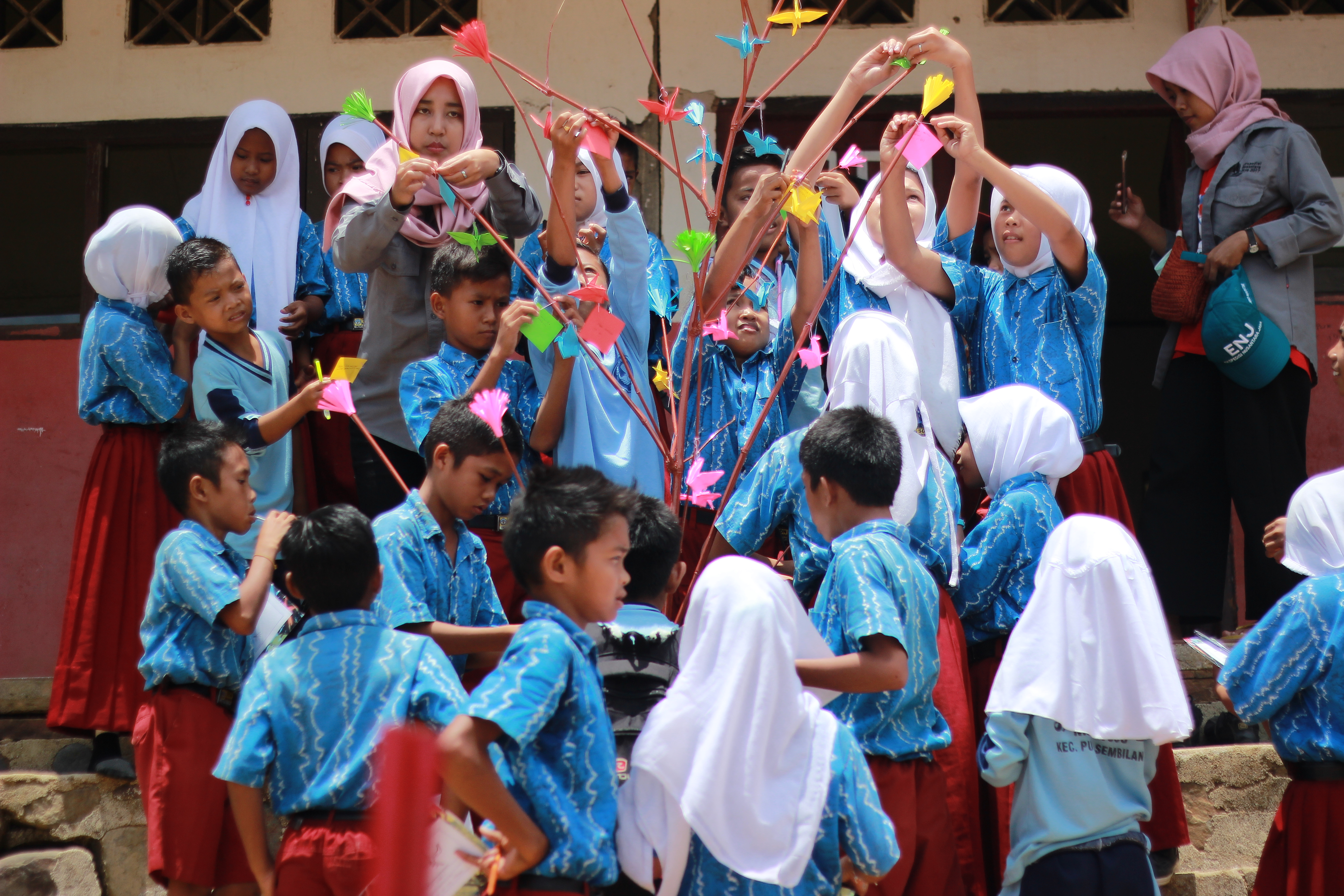 Siswa(i) SD Maradapan